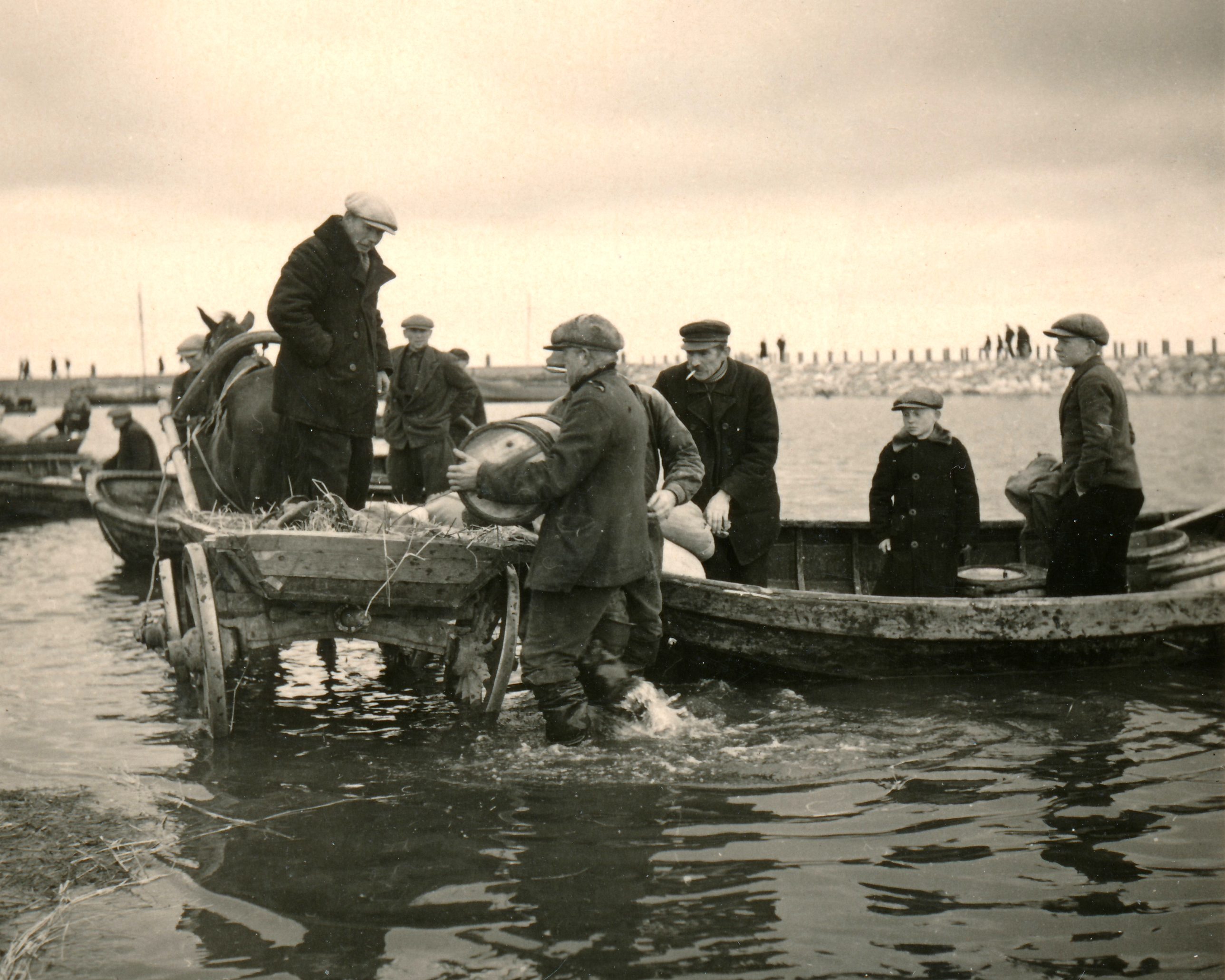 Silgulaat Kaupsaare sadamas Mahu rannas